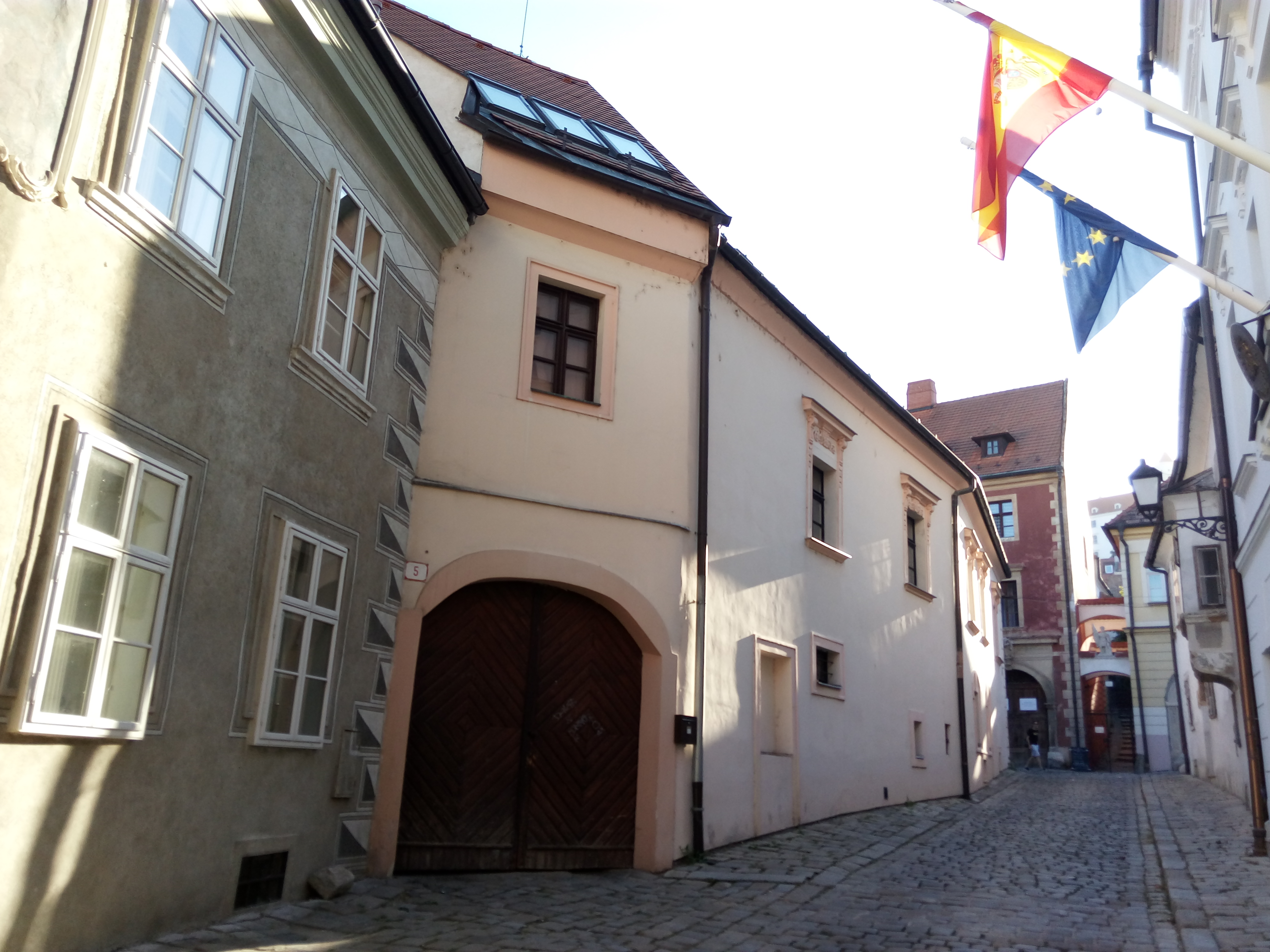 Prepoštská 5, Staré Mesto, Bratislava